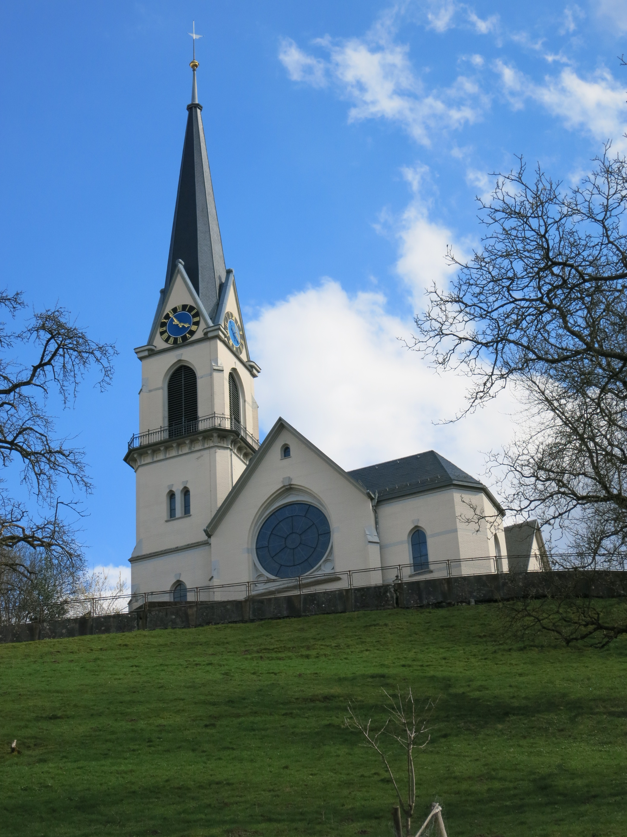 Reformierte Kirche Adliswil ZH, Schweiz